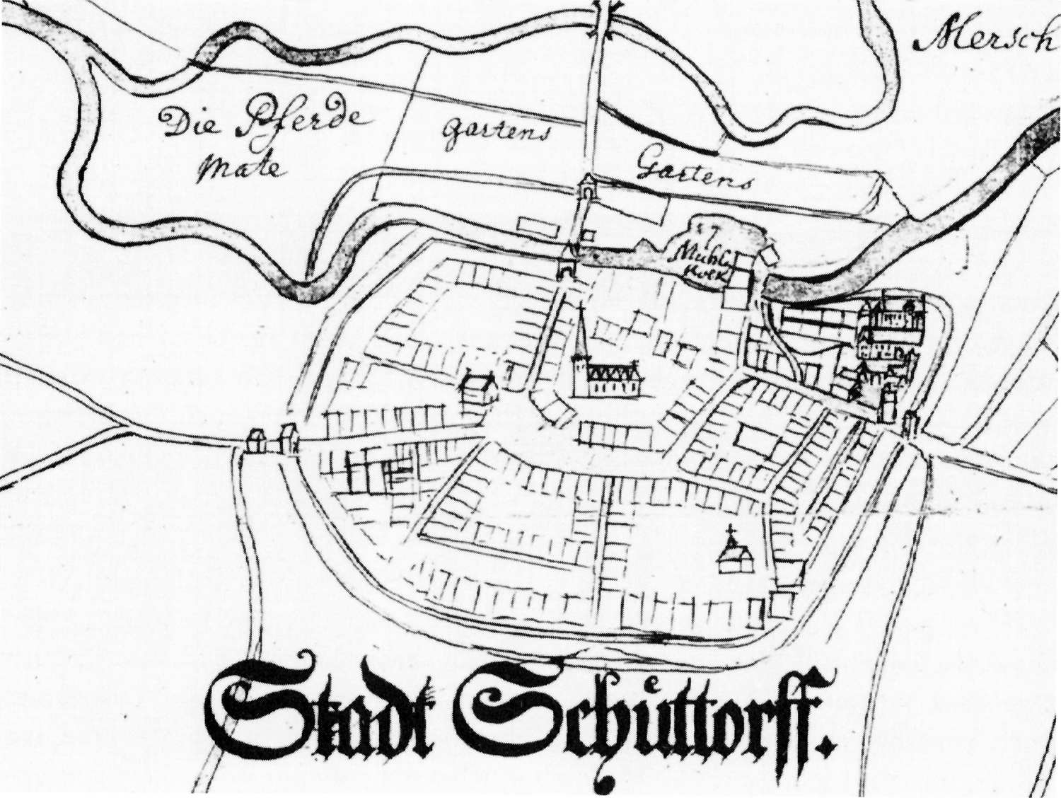 Eine undatierte Karte aus der Vogelperspektive der Stadt Schüttorf von Westen gesehen, vermutlich aus dem 18. Jahrhundert